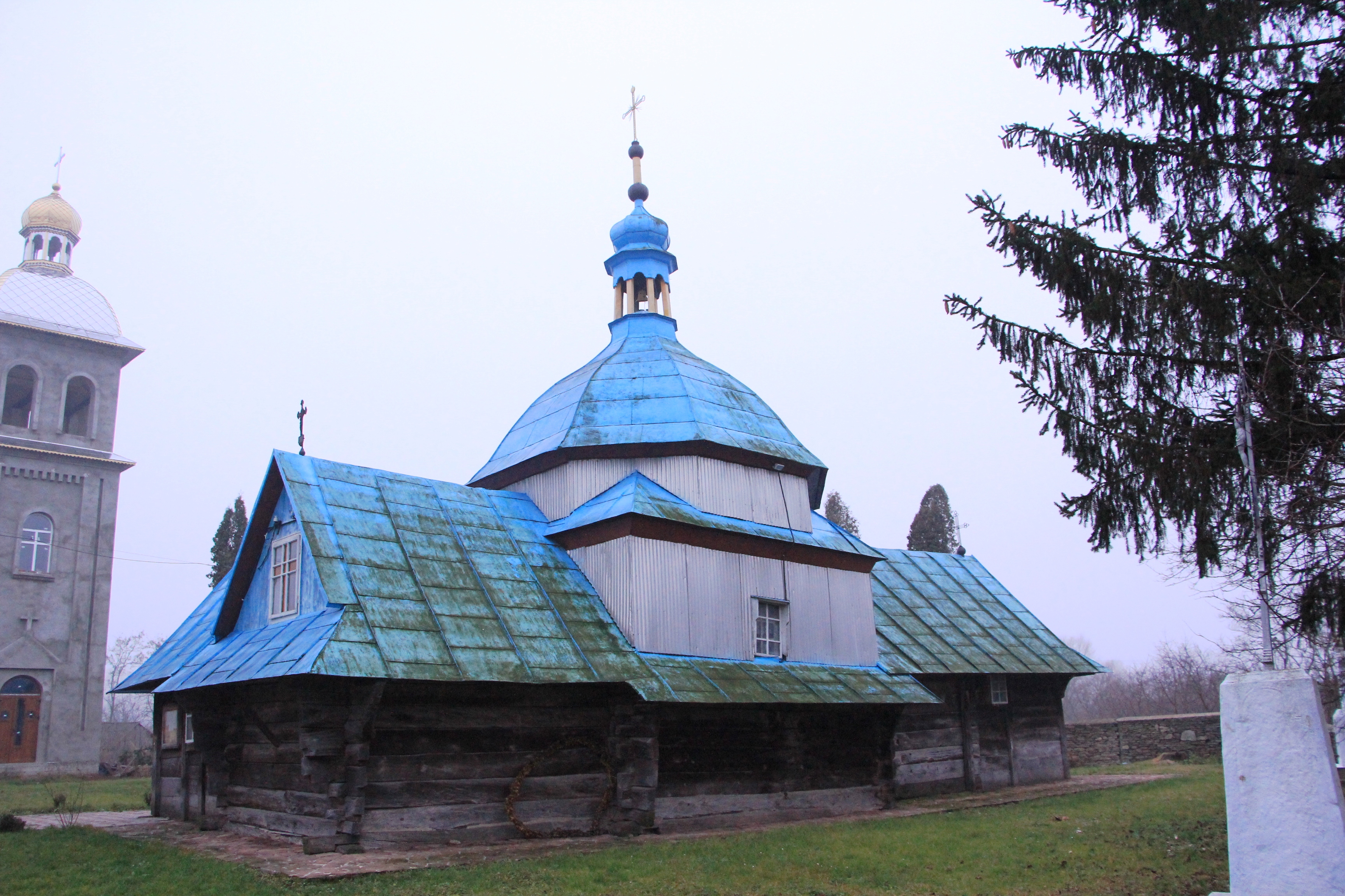 Церква Пресвятої Тройці 1584